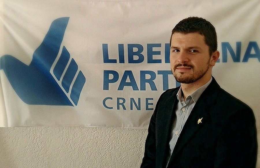 Srpski (latinica): Portparol Liberalne partije Crne Gore